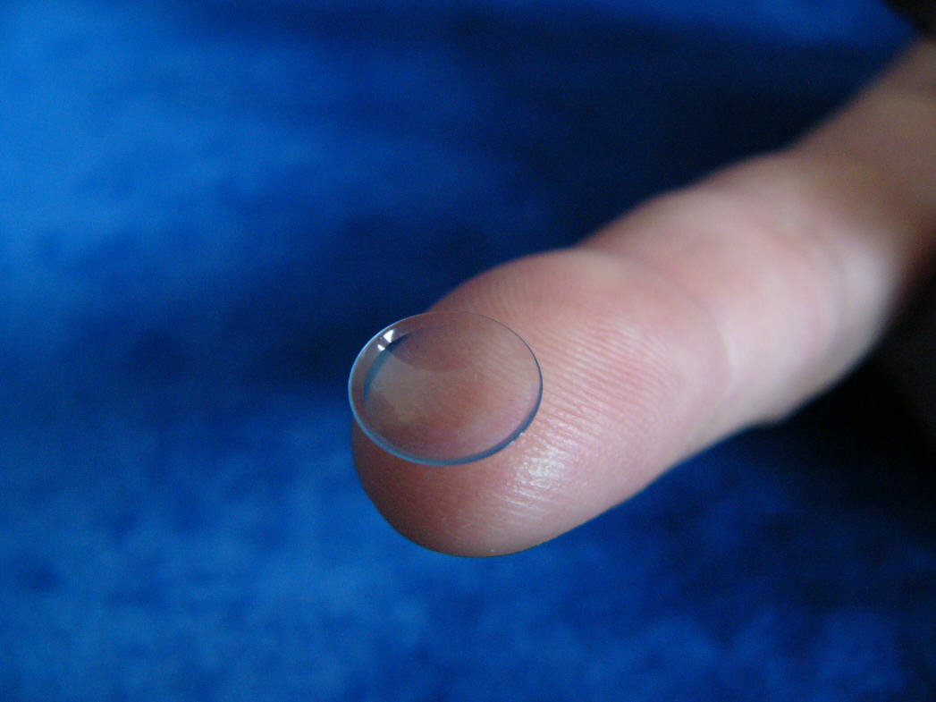 Weiche Kontaktlinse